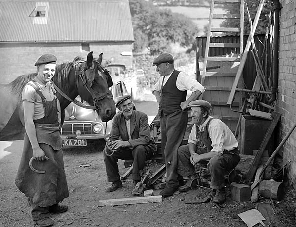 Teitl Cymraeg/Welsh title: Gof yn Llwyn-mawr. Ffotograffydd/Photographer: Geoff Charles (1909-2002) Dyddiad/Date: September 1, 1955. Cyfrwng/Medium: Negydd ffilm / Film negative Cyfeiriad/Reference: (gch08605) Rhif cofnod / Record no.: 3368909 Rhagor o wybodaeth am gasgliad Geoff Charles yn Llyfrgell Genedlaethol Cymru More information about the Geoff Charles Collection at the National Library of Wales